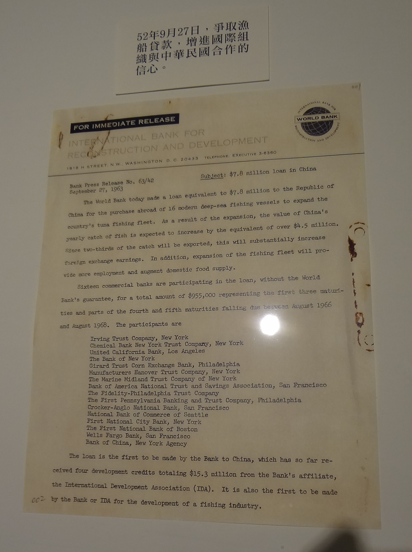 中華民國國立國父紀念館展示的嚴家淦文物：1963年9月27日世界銀行新聞稿，說明嚴家淦向世界銀行爭取中華民國漁船貸款。